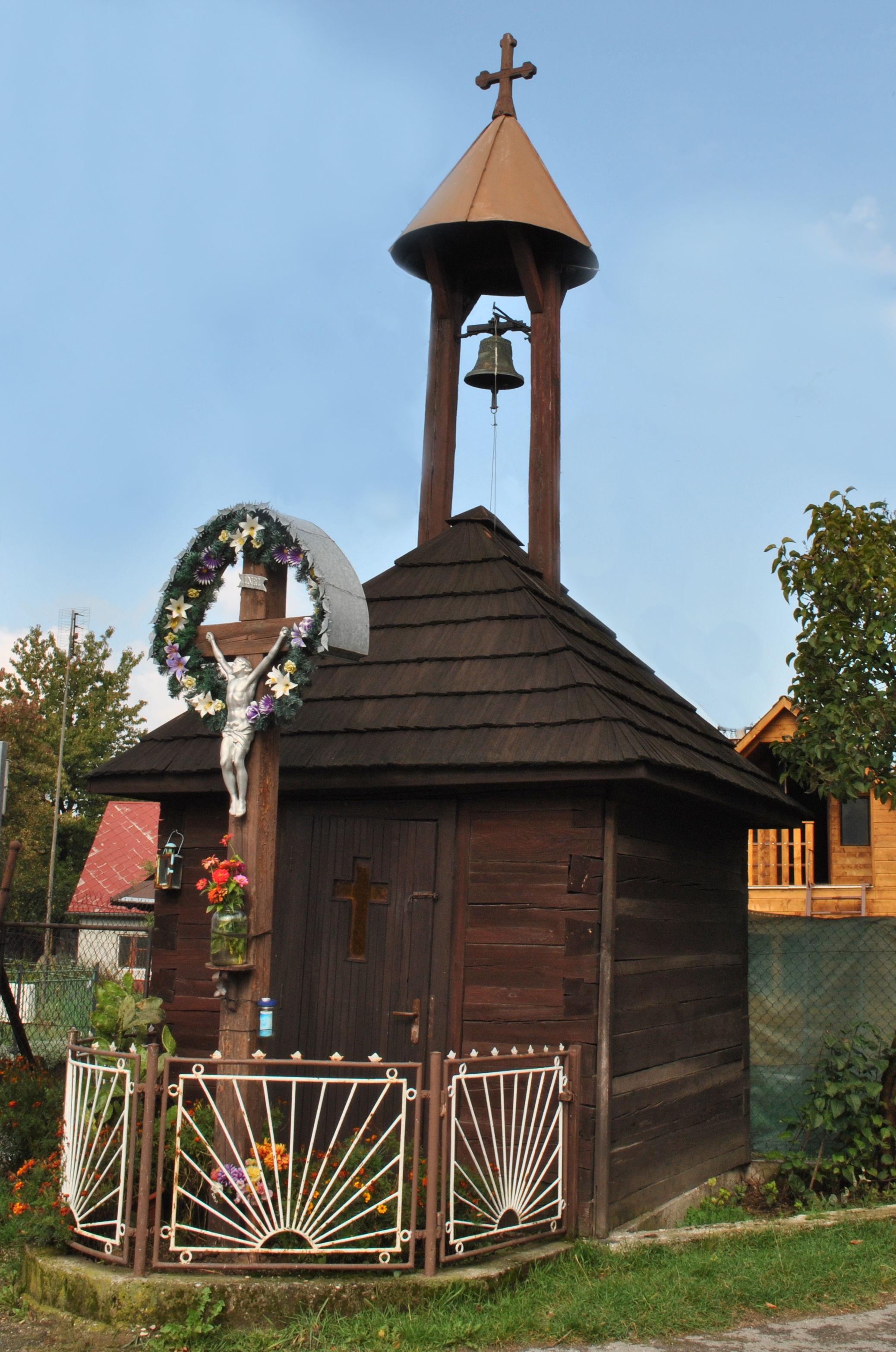 zrubová zvonica na Priedhorí z konca 19. stor.